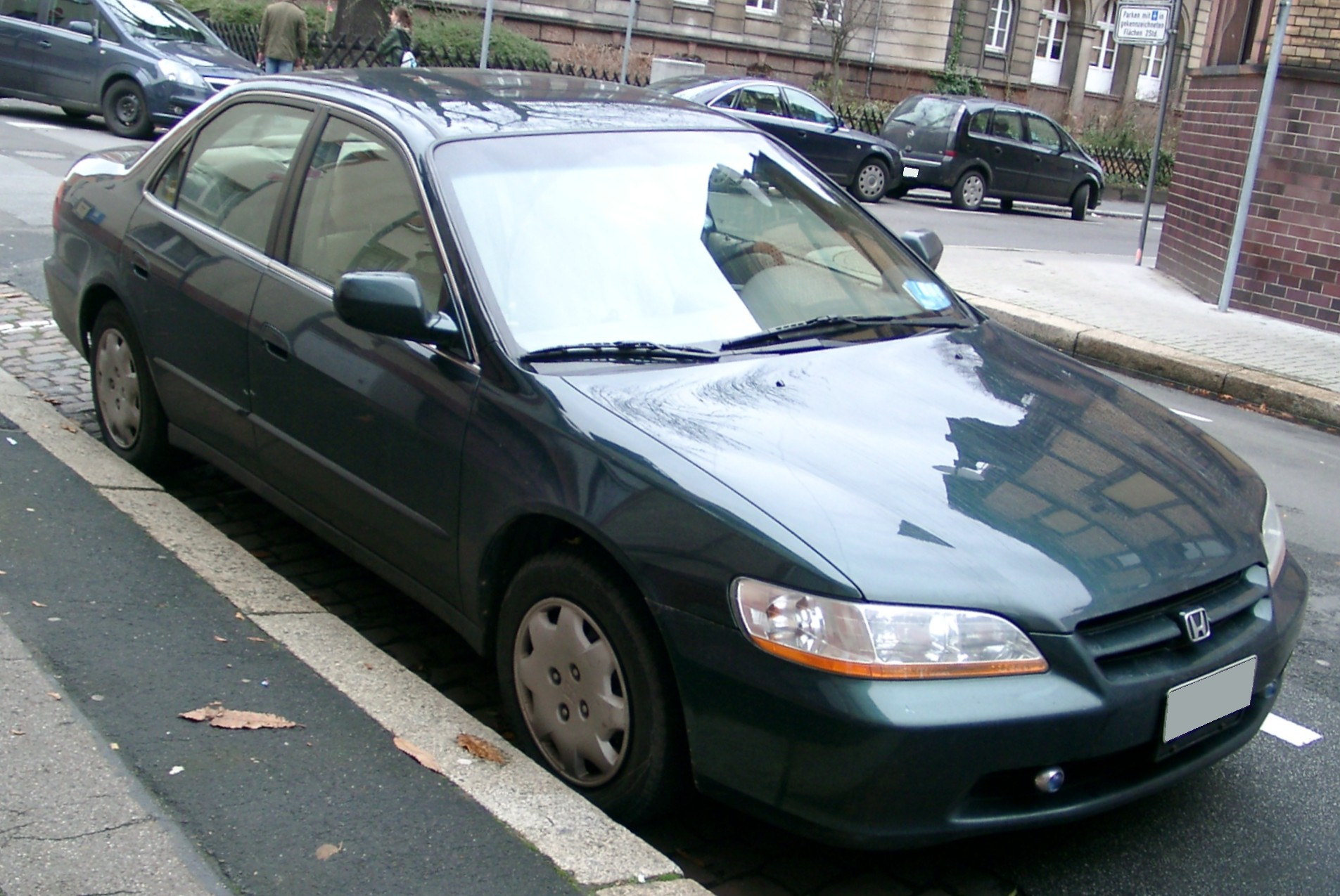 Honda Accord, 6. Generation